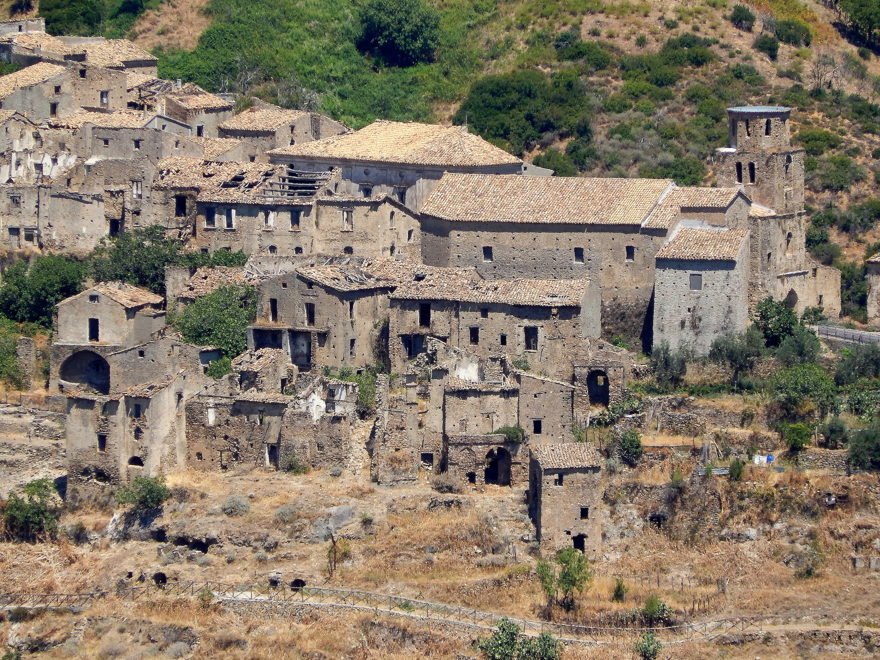 Il borgo medievale di Campana (CS). A destra la maestosa torre campanara di epoca normanna.